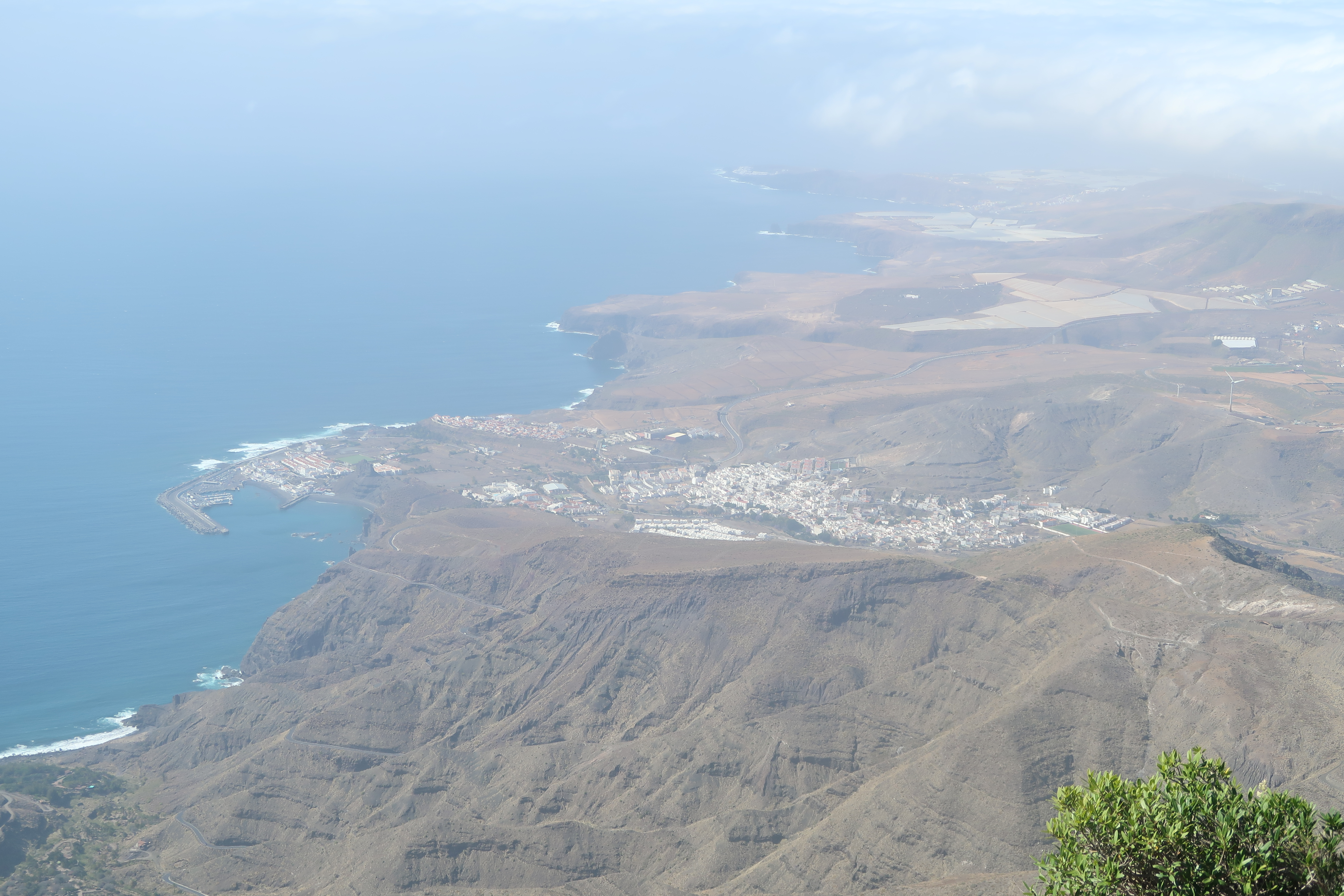 visto desde Tamadaba